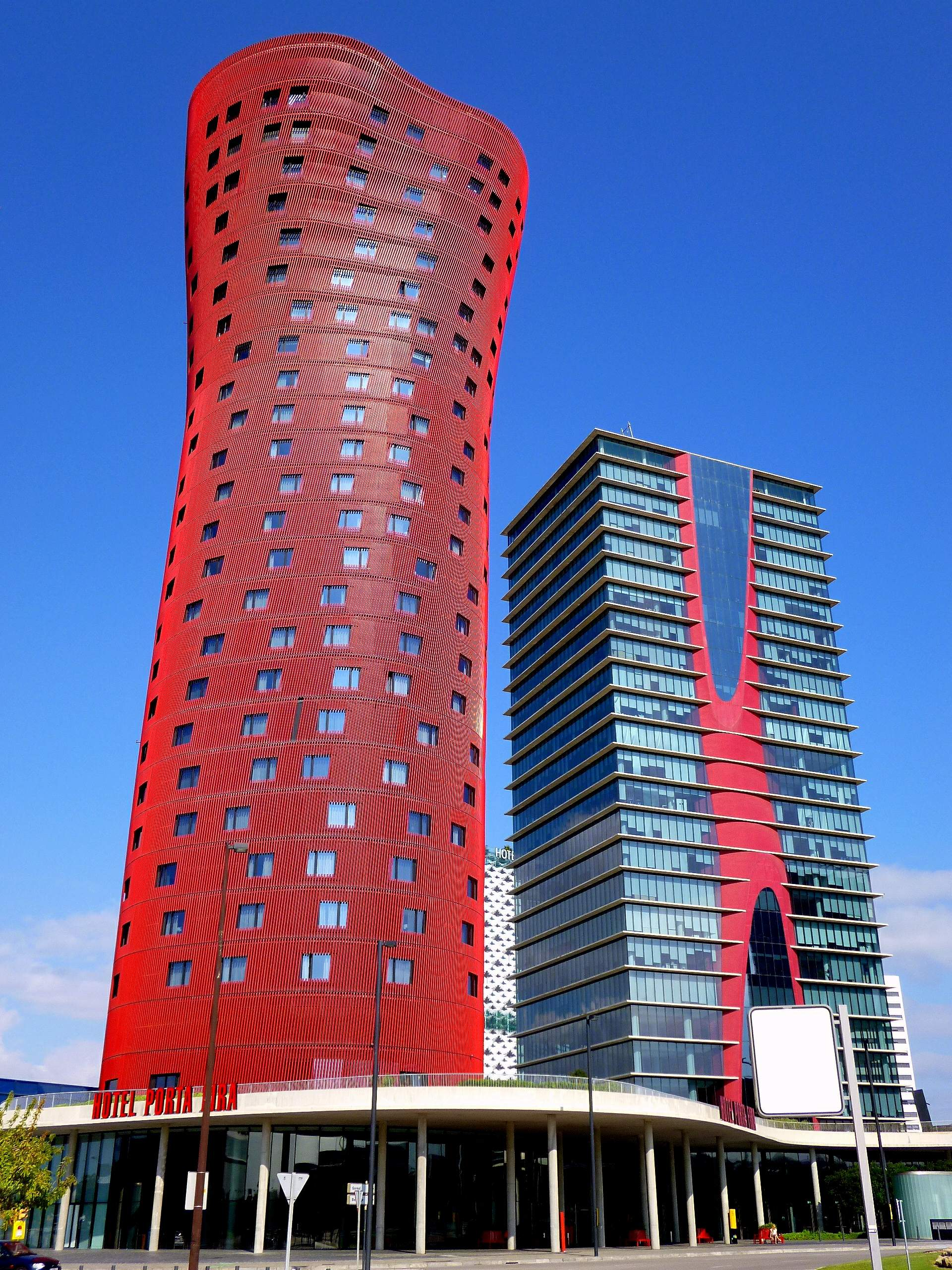 Torres de Toyo Ito (Torres Porta Fira), consistentes en el Hotel Porta Fira y la Torre Realia BCN, emplazadas en la Plaza de Europa de Hospitalet de Llobregat (Barcelona)